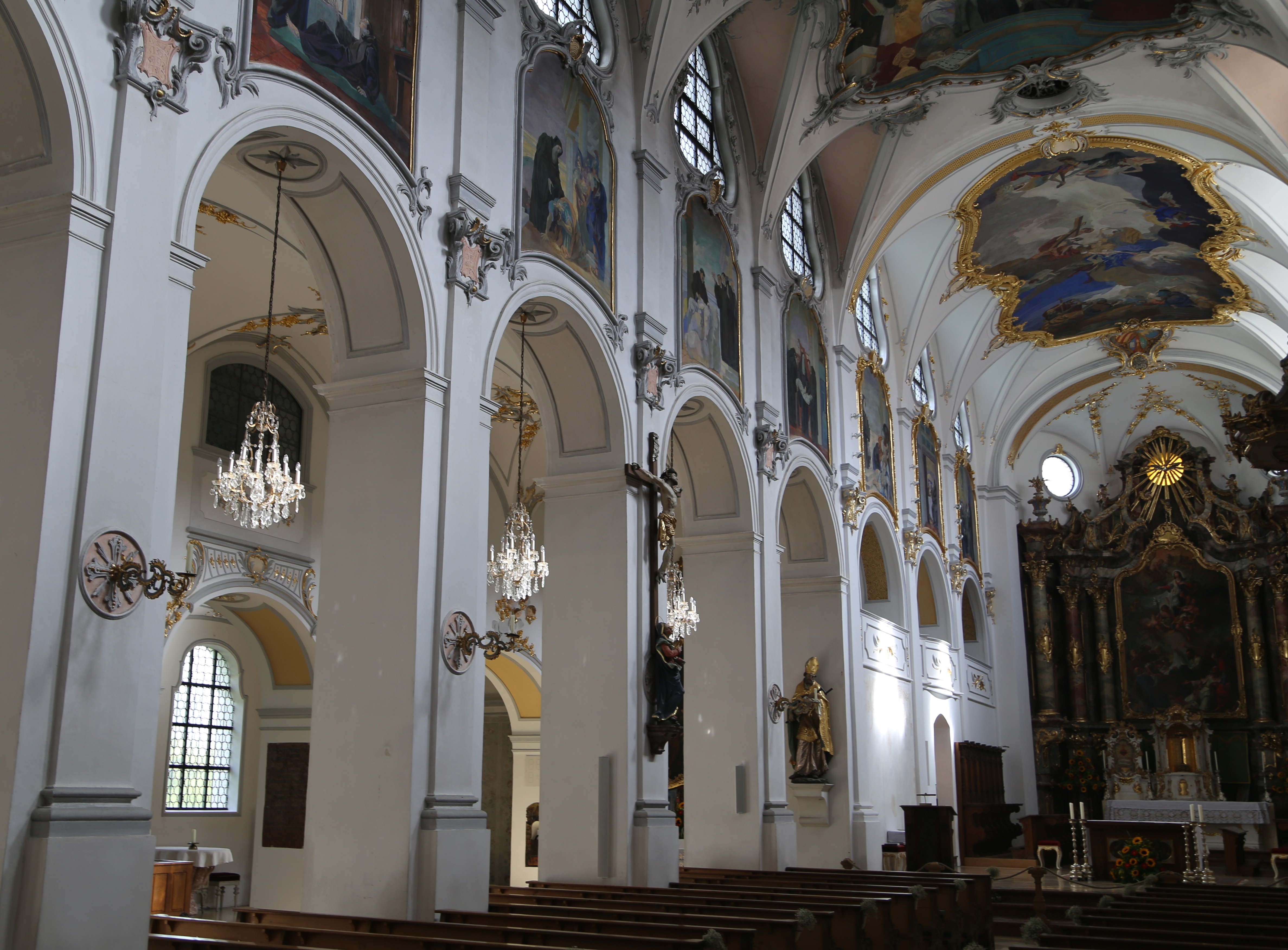 Kloster Scheyern;Katholische Pfarr- und Benediktinerabteikirche Mariä Himmelfahrt, dreischiffige Basilika mit zweijochigem Chor mit Apsis und ursprünglich freistehendem Südwestturm mit Blendengliederung und Helm über Dreiecksgiebeln, Mittelschiff und Chor mit Stichkappentonnen, Seitenschiffe mit Kreuzgratgewölben, im Kern romanisch, geweiht 1215, Turm um 1230